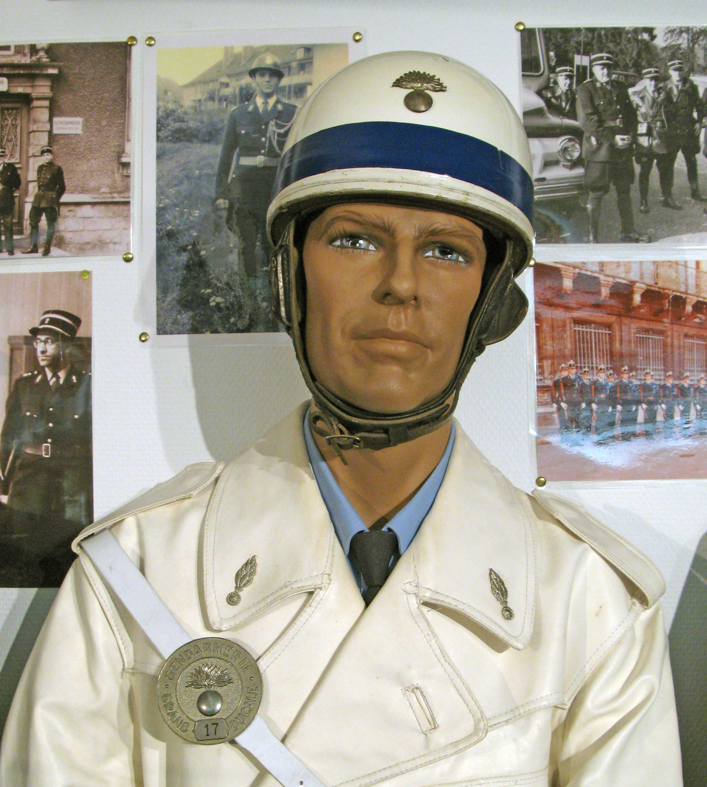 Uniform vun der "Fligent" vun 1975, am Polizeimusée.